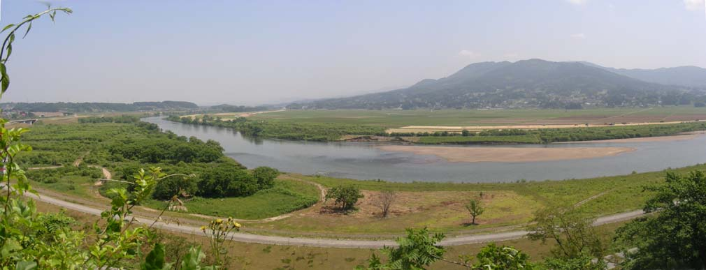 岩手県平泉町の高舘義経堂から見た束稲山と北上川。2008年6月9日撮影